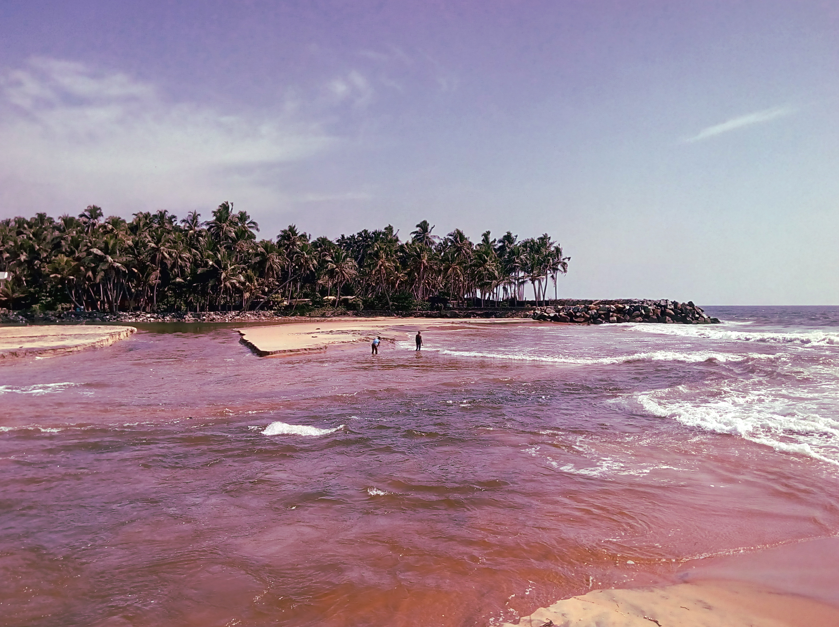 പൂന്തുറ പൊഴി